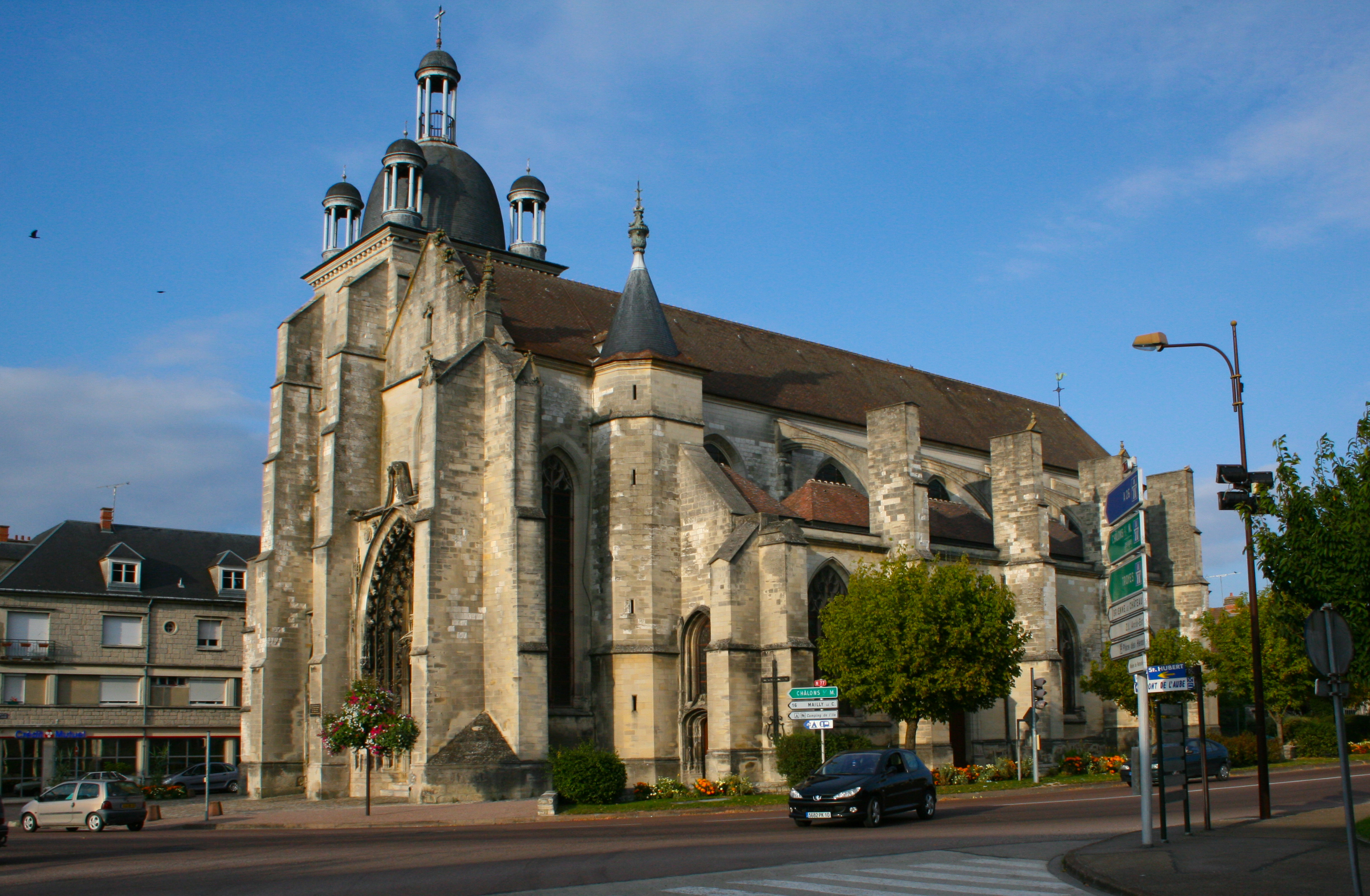 Église Saint-Étienne d'Arcis-sur-Aube, classée monument historique en 1840.